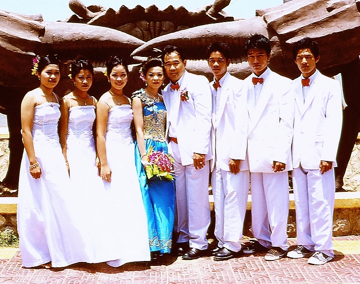 Khmer wedding photo Kep Cambodia 2004